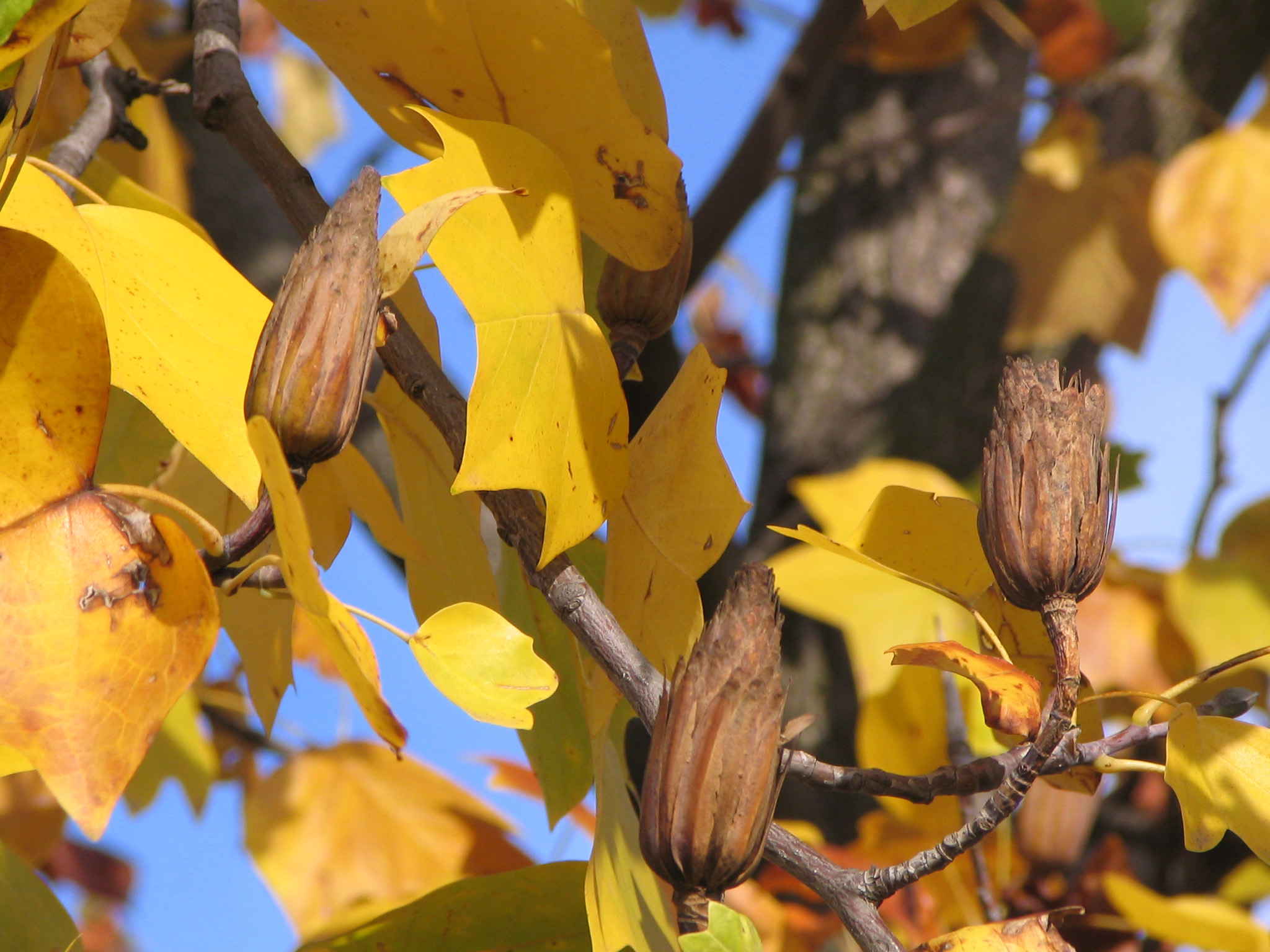 Збирни шишаричасти плодови лалиног дрвета (аутор: Михаило Грбић)